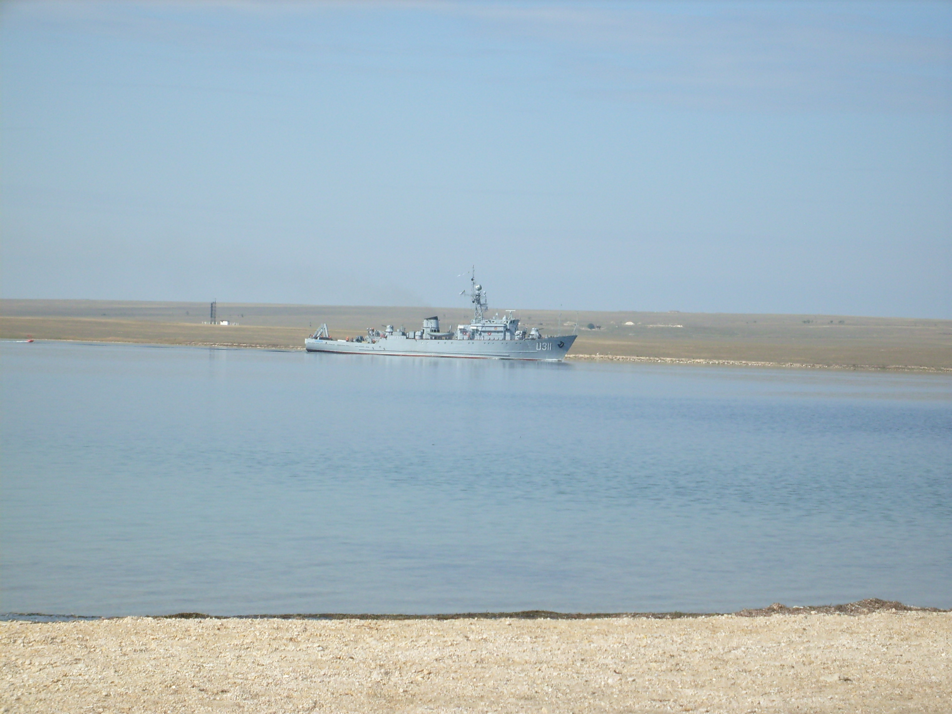 Тральщик «Черкассы» (U311)